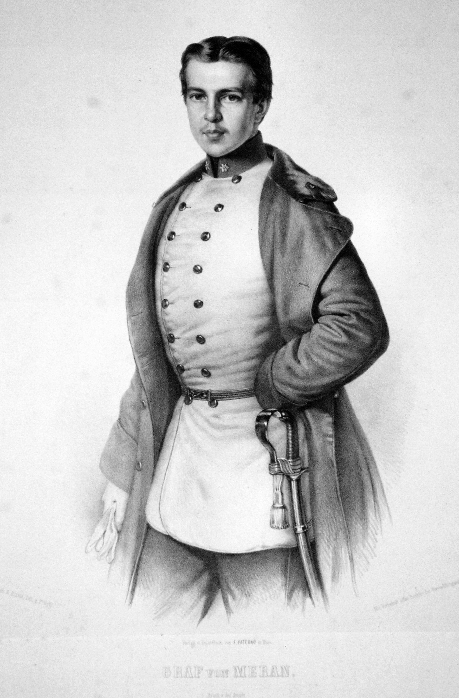 Franz Graf von Merran (1839-1891) Einziger Sojhn von Erzherzog Johann von Österreich. Lithographie von Franz Eybl, nach Anton Einsle.